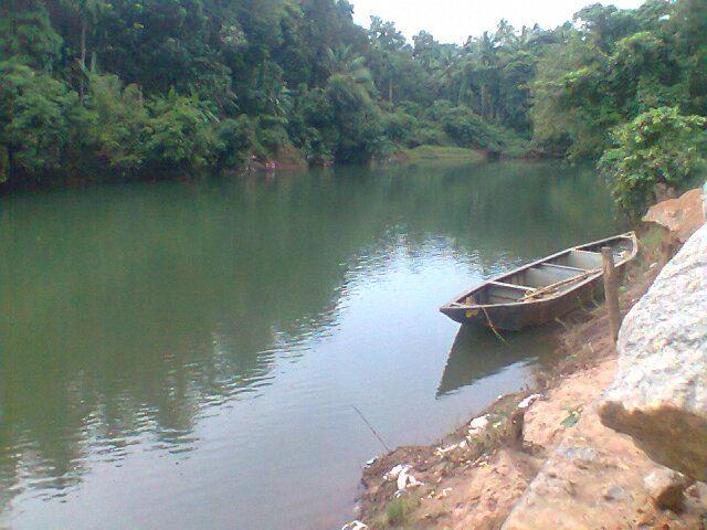 ഇരുവഴിഞ്ഞിപ്പുഴ